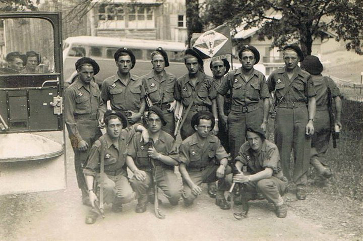 Éléments des Commandos de France autour du fanion de l'unité Juin 1945, Immenstadt en Allemagne. L'aïeul de Mr médérick est le troisième en partant de la gauche au premier rang (chasseur sans armement) Collection Burgé Médérick - Autorisation de publier la photographie via le site (Cf.